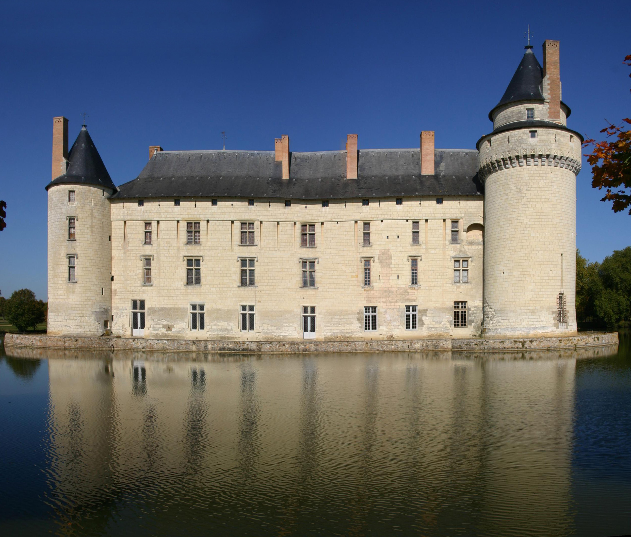 Schloss Plessis-Bourré